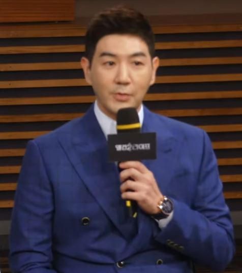 5일 오후 서울시 마포구 상암동 MBC에서 MBC 새 월화드라마 '웰컴2라이프' 제작발표회가 열렸다.